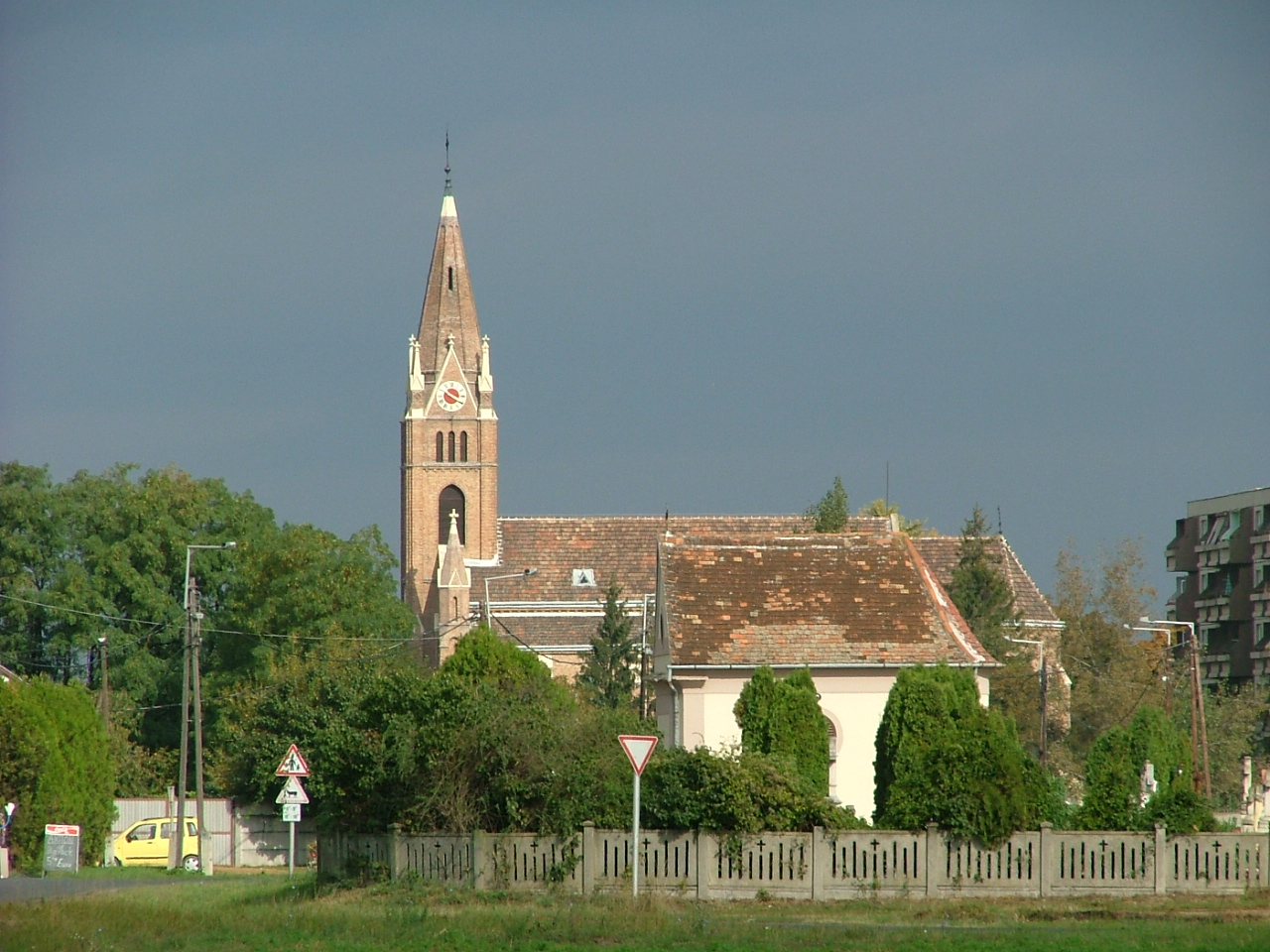 Szent András római katolikus templom távlati képe (Fertőd)